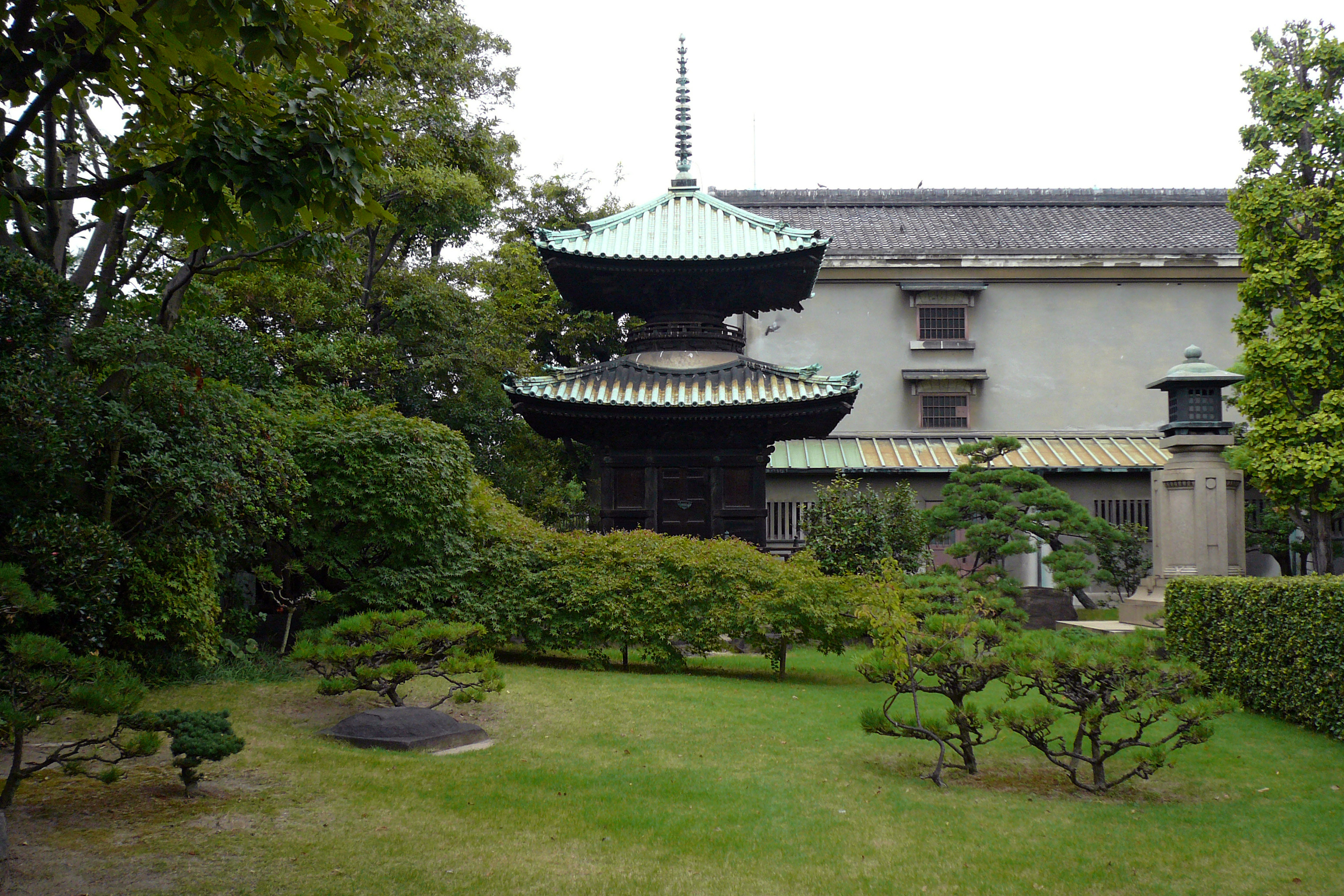 Fujita Museum in Osaka, Osaka prefecture, Japan